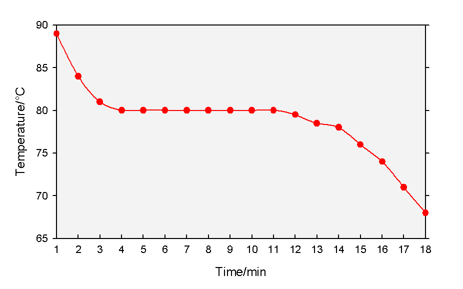 CUrva di raffreddamento del naftalene. Y values: 89, 84, 81, 80, 80, 80, 80, 80, 80, 80, 80, 79.5, 78.5, 78, 76, 74, 71, 68.